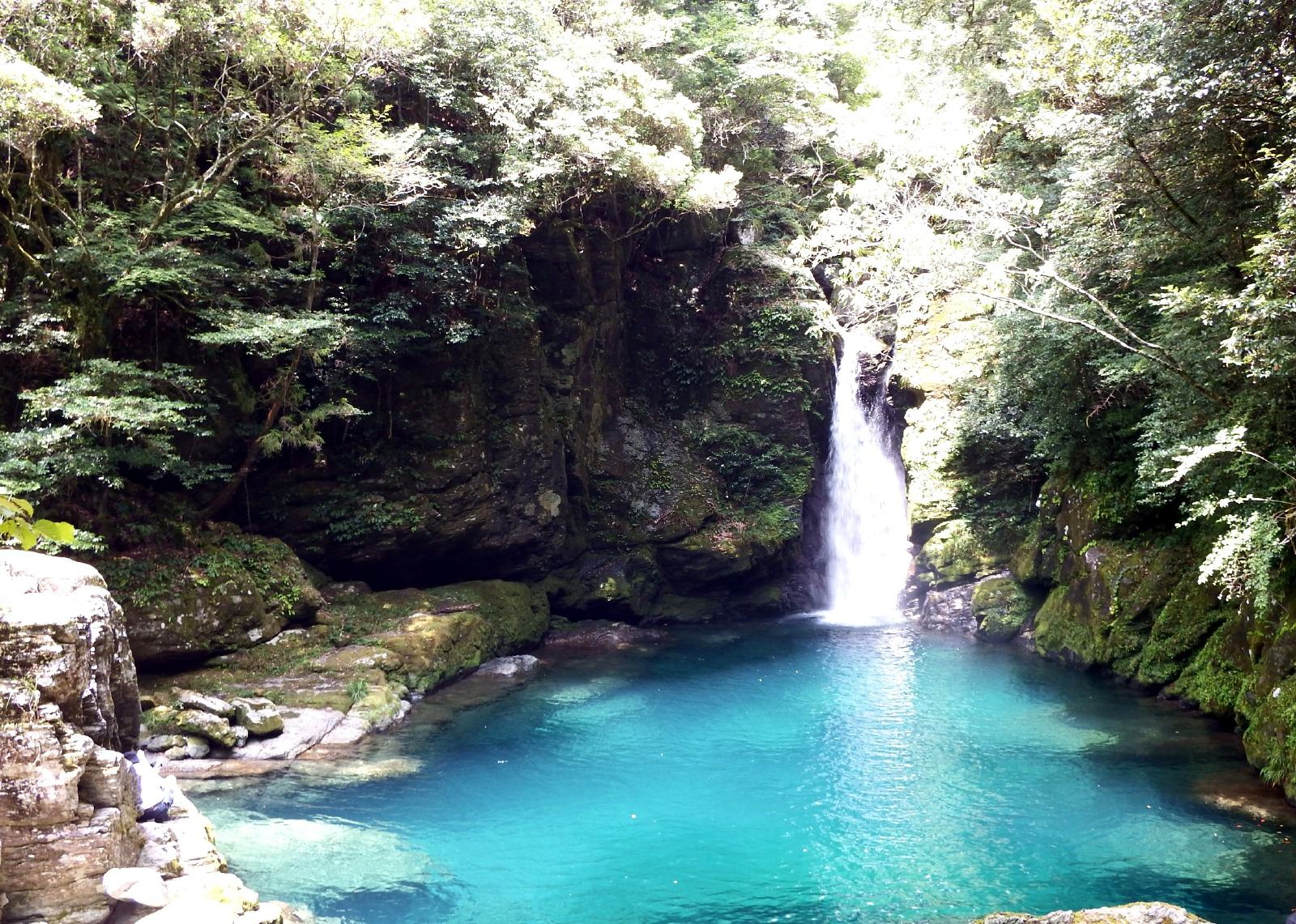 にこ淵は仁淀ブルー